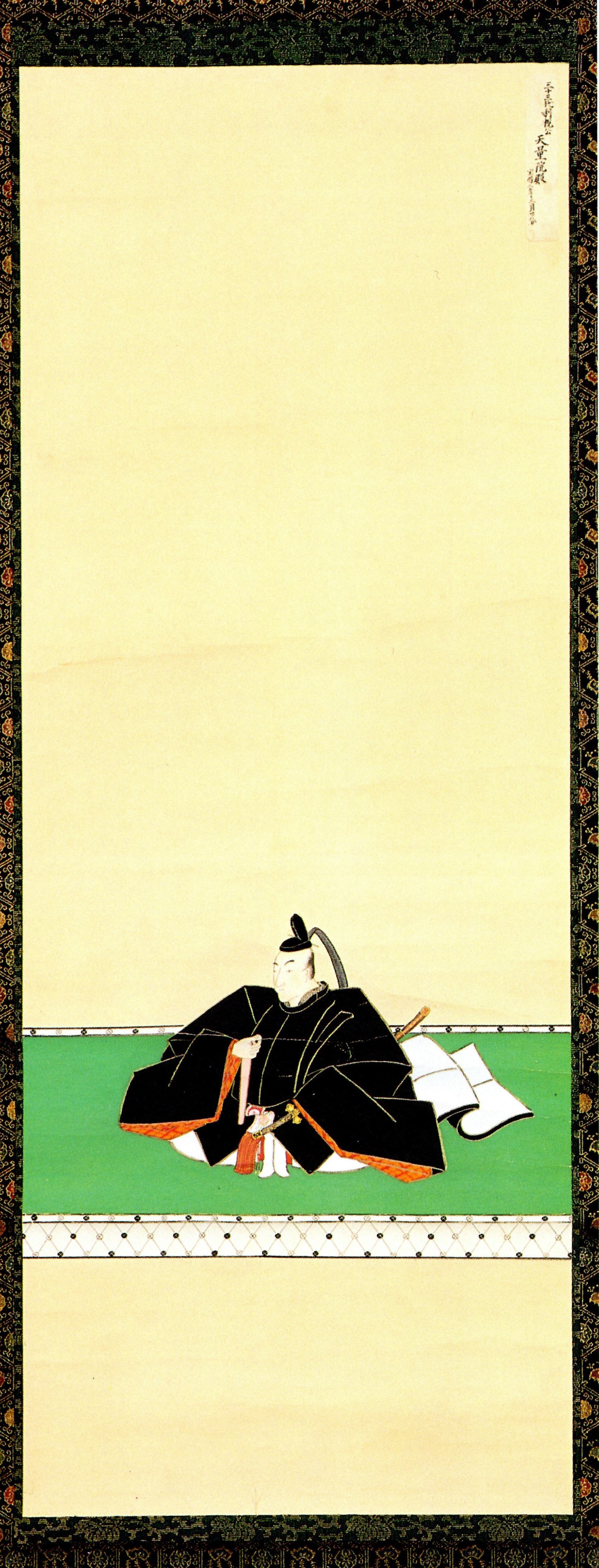 南部利視の肖像。